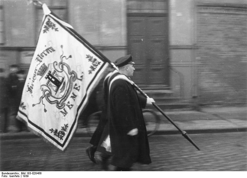 Auf Vorposten an der Memel Eine Fahne der Vereinigten Krieger- und Frontkämpferverbände in Memel Auf. Isenfels